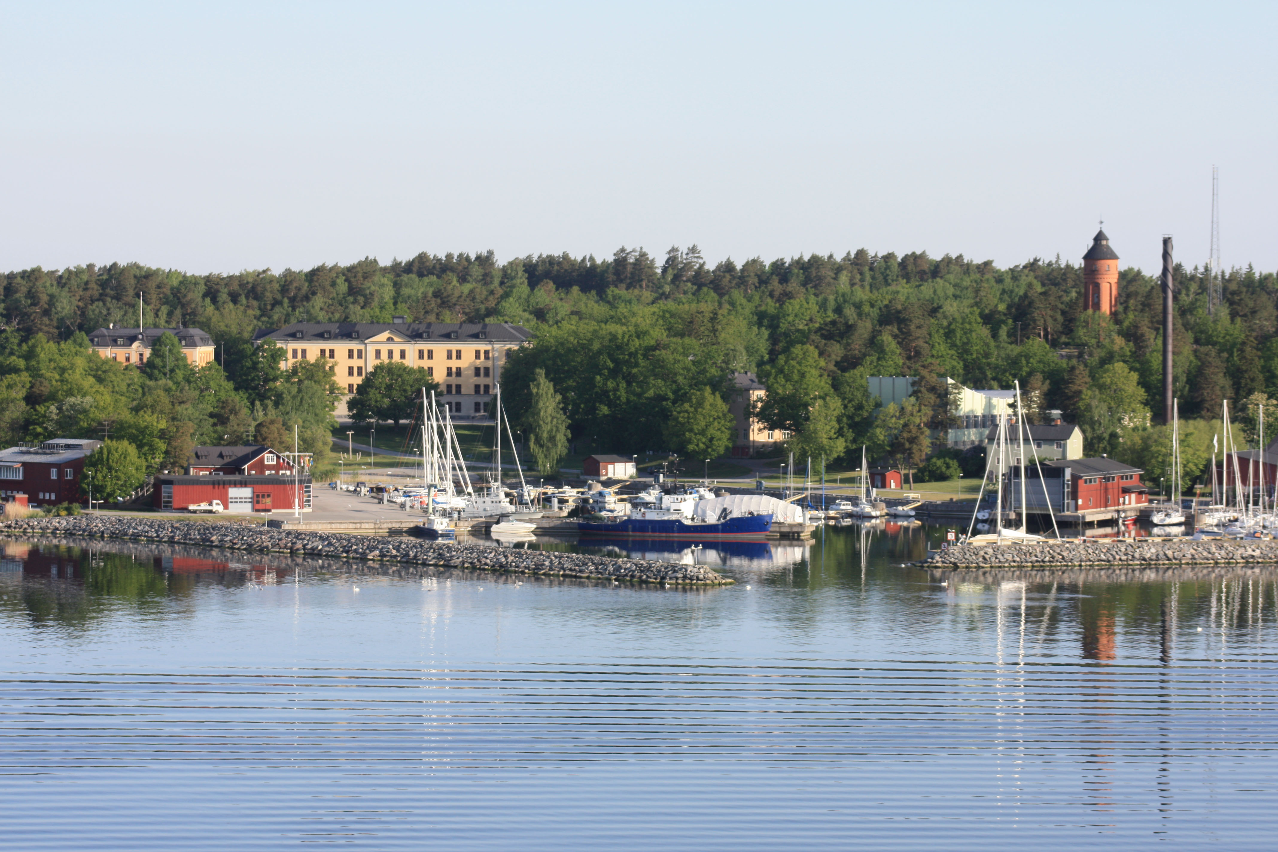 Oskar Fredriksborg